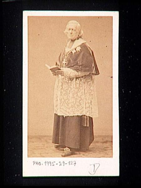 Charles Joseph Eugène de Mazenod (1782—1861)